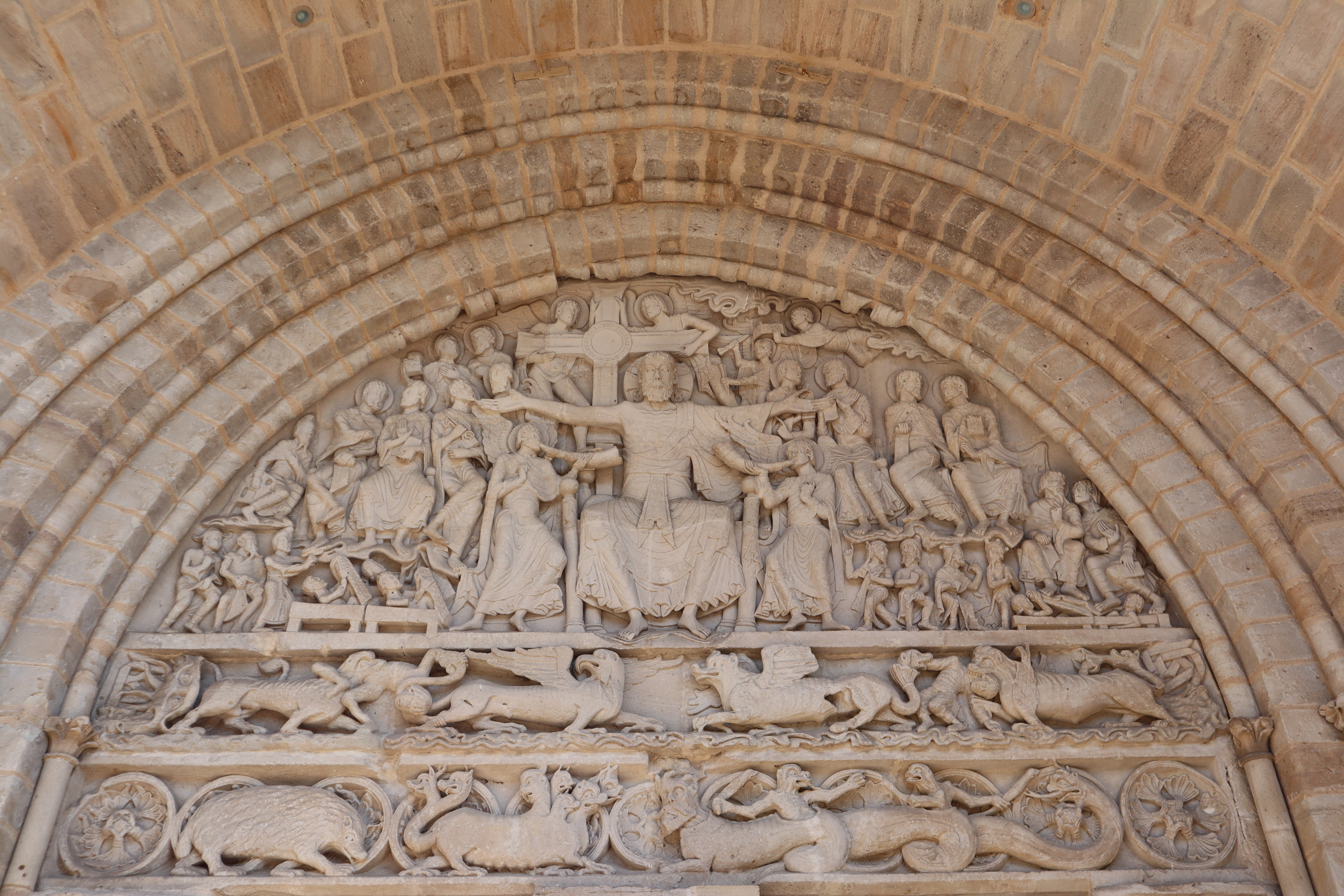 Tympan du portail méridional de l'abbatiale Saint-Pierre de Beaulieu-sur-Dordogne (19).